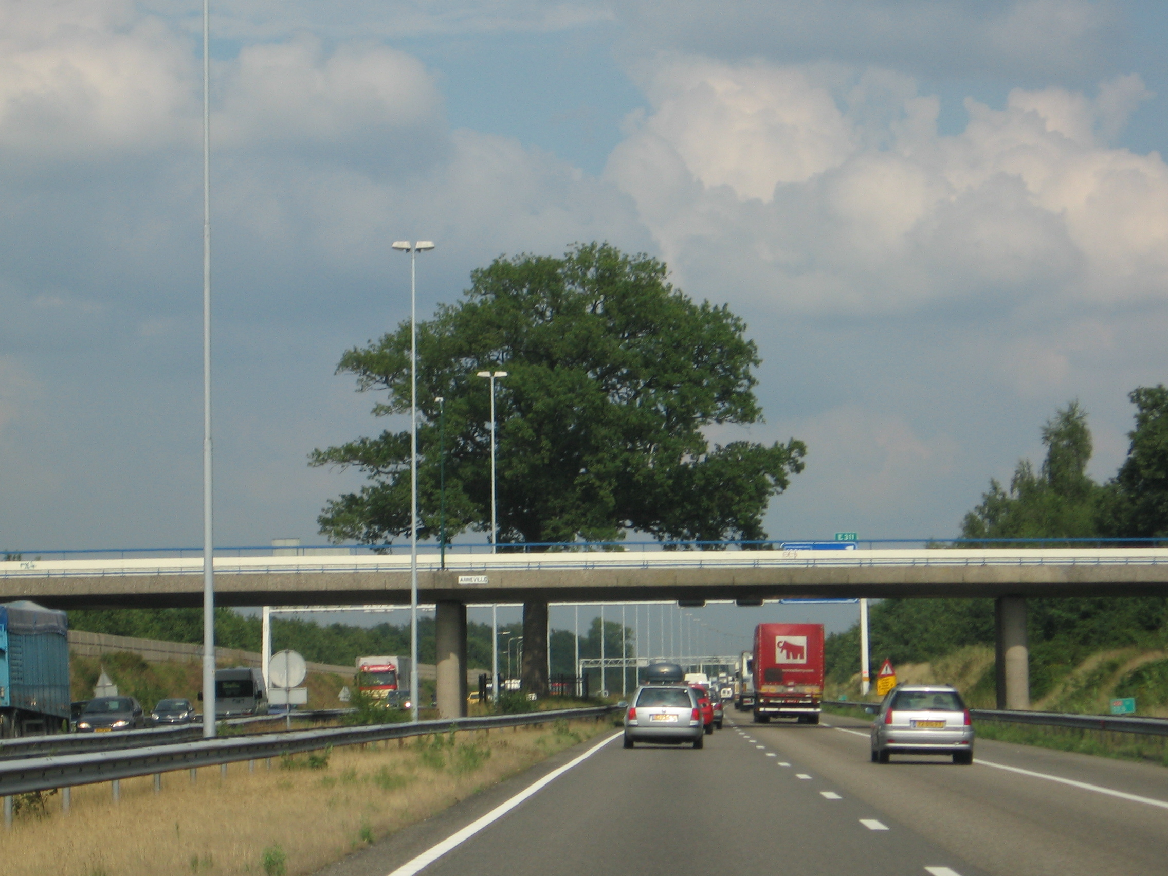 A58, Breda, boom in het midden de oude eik Anneville genoemd naar landgoed Annaville